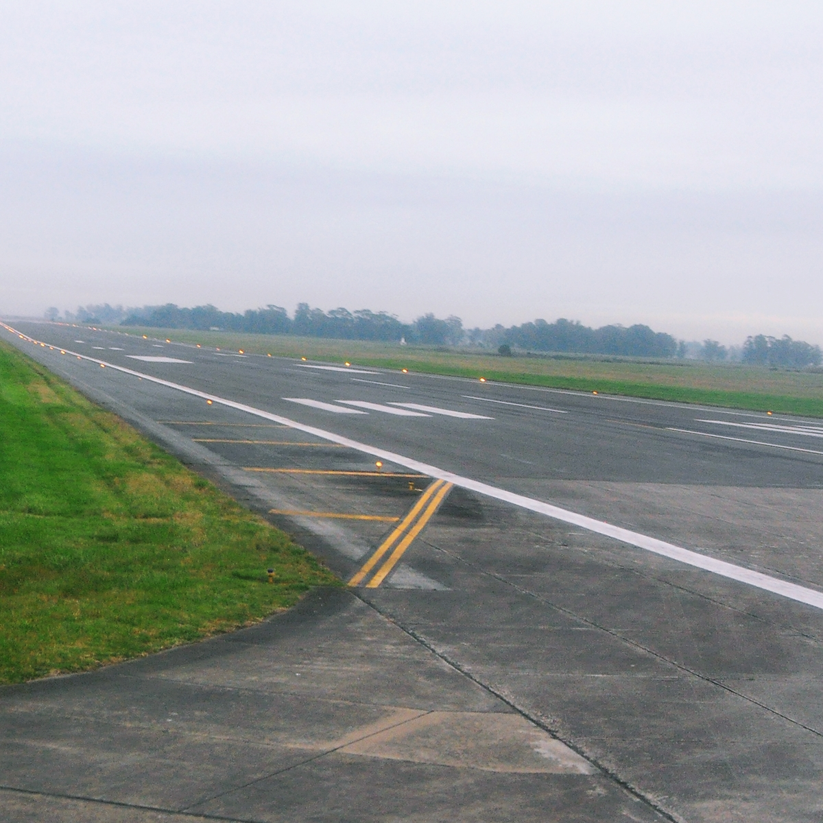 Pista de Aterrizaje del Aeropuerto de Mar Del Plata, vista desde un Embraer 190 de Austral Lineas Aéreas -- Agosto 2017.